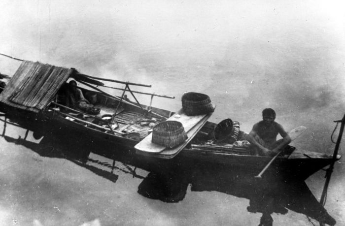 Repronegatief. Woonschuit van een Oerang-Laoet familie, Ka. Toengkal